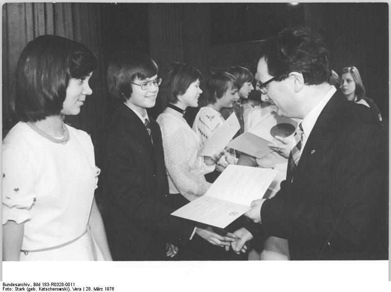 Berlin, Jugendweihe, Feierstunde ADN-ZB Stark 28.3.1976 Berlin: Jugendweiheveranstaltung in der Staatsoper-Ihre feierliche Jugendweihe erhielten am 28.3.1976 Mädchen und Jungen der Pankower Wilhelm-Pieck-Oberschule in der Staatsoper Unter den Linden. In zahlreichen Jugendstunden hatten sich die 131 Jugendlichen gründlich auf dieses wichtige Ereignis vorbereitet. Prof. Michaal Benjamin von der Akademie für Staat und Recht hielt die Festrede und überreichte die Urkunden. -siehe auch 12 N